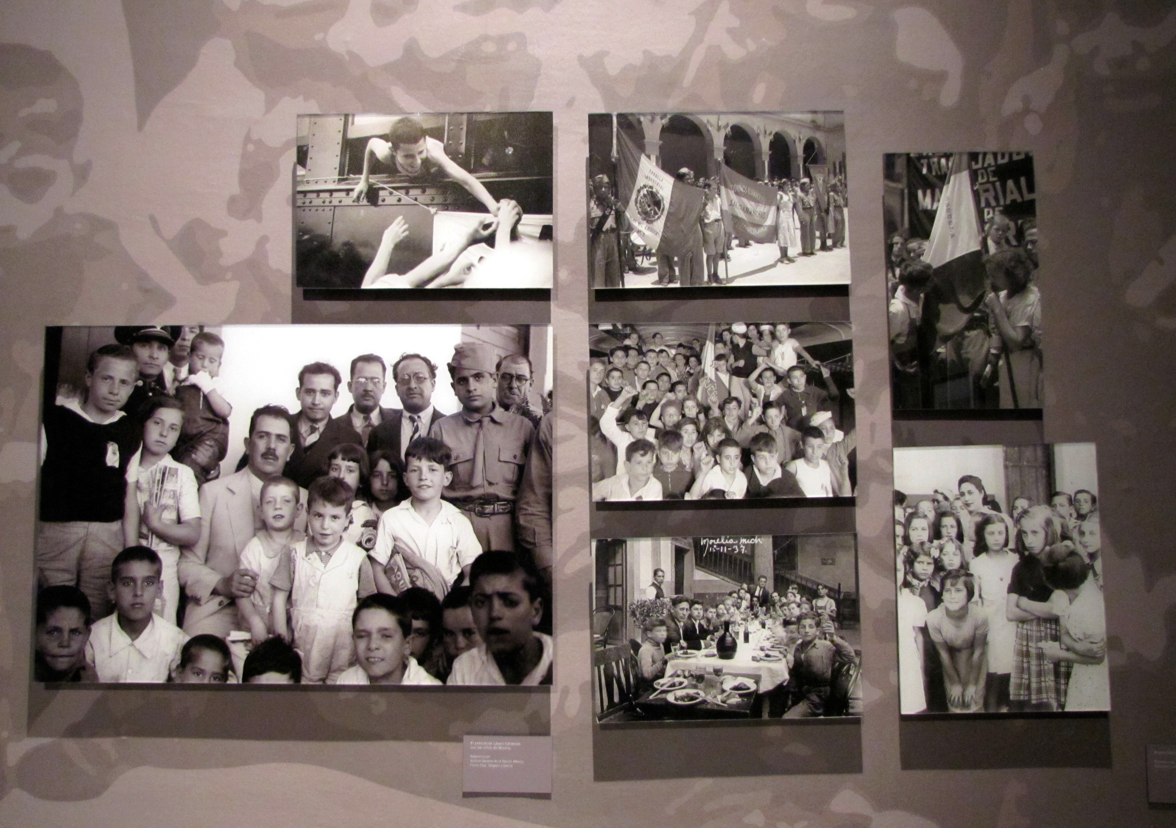 Muchos padres españoles mandaron a sus hijos en los barcos transatlánticos a México para iniciar una nueva vida lejos de la Guerra.